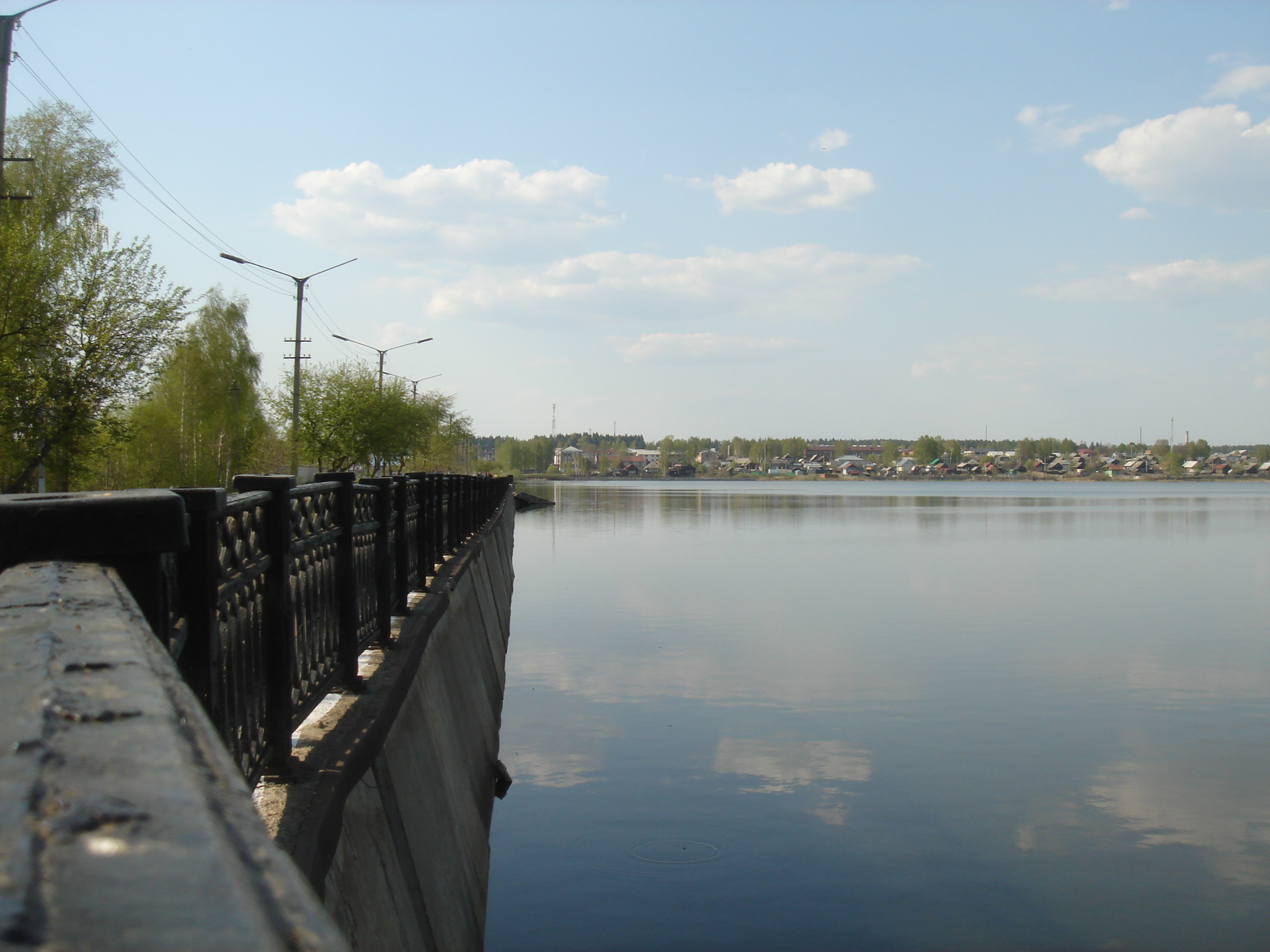 Камбарский пруд